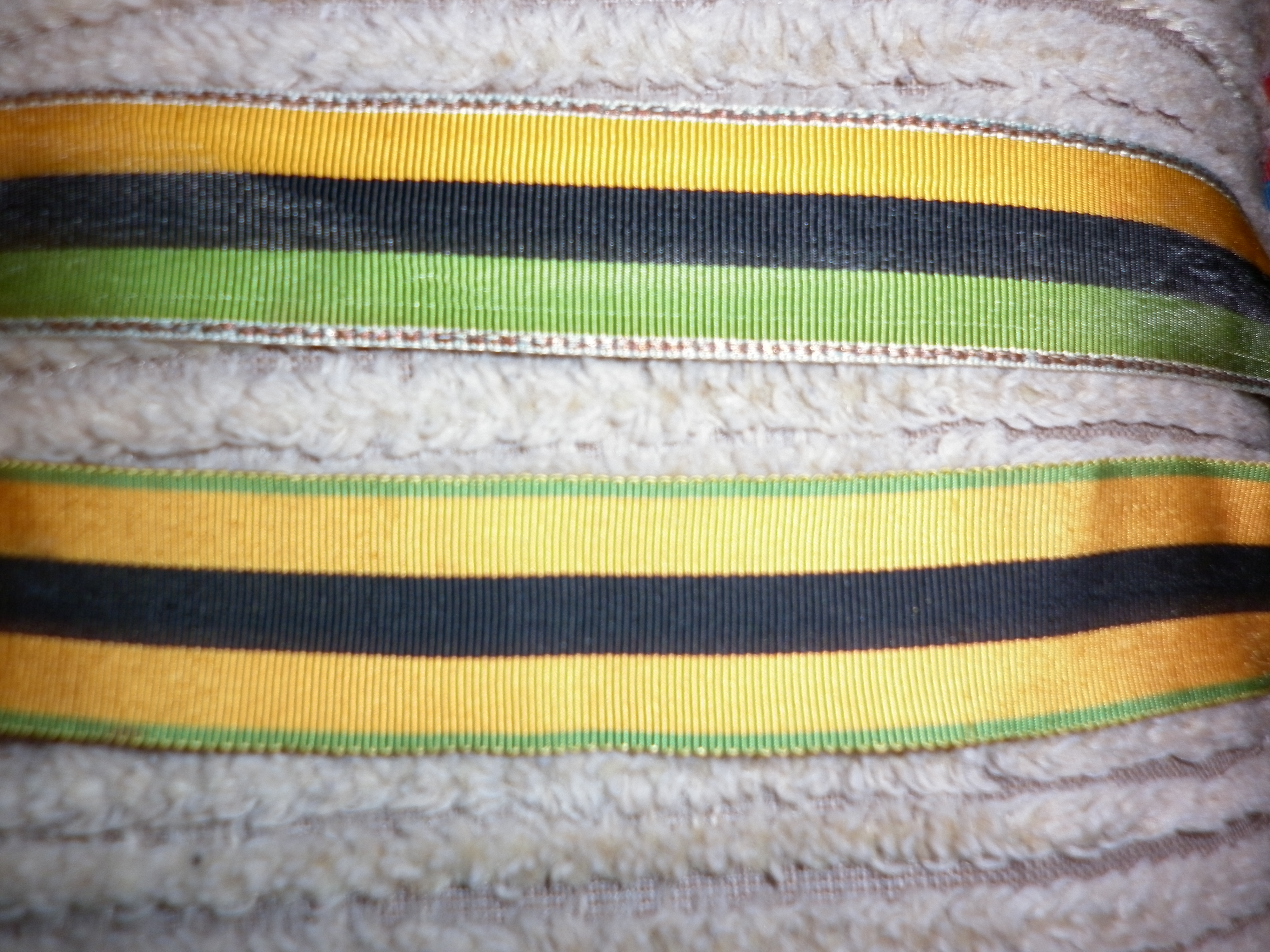 Burschenband (oben) und Fuxenband (unten) der Sängerschaft Rheno-Silesia zu Clausthal